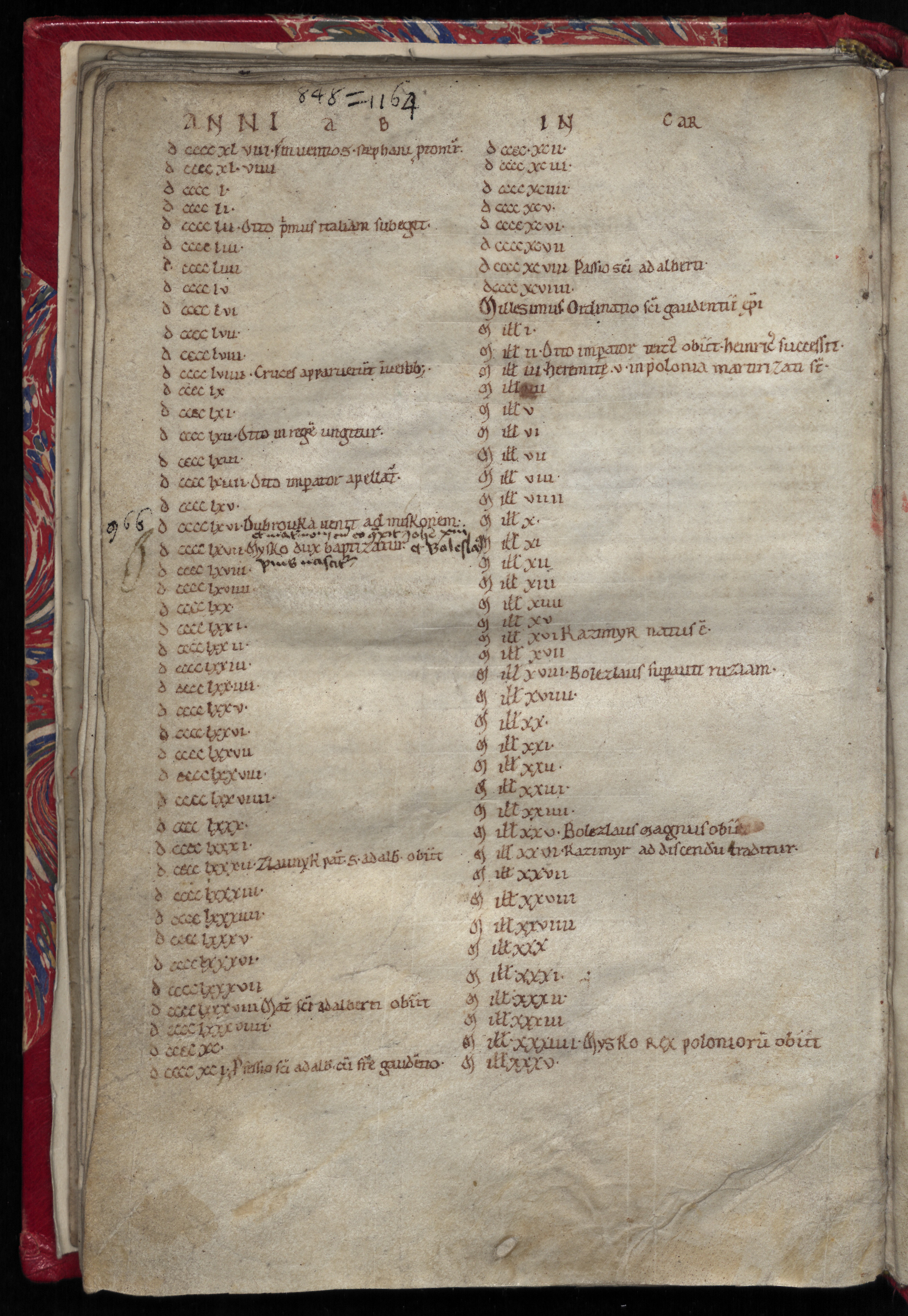 Rocznik świętokrzyski dawny, pocz. XII w., k. 38v